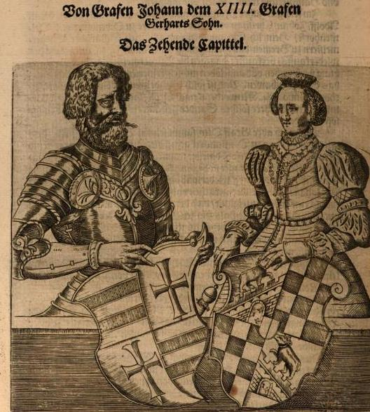 Johann V XIIII Graf von Oldenburg